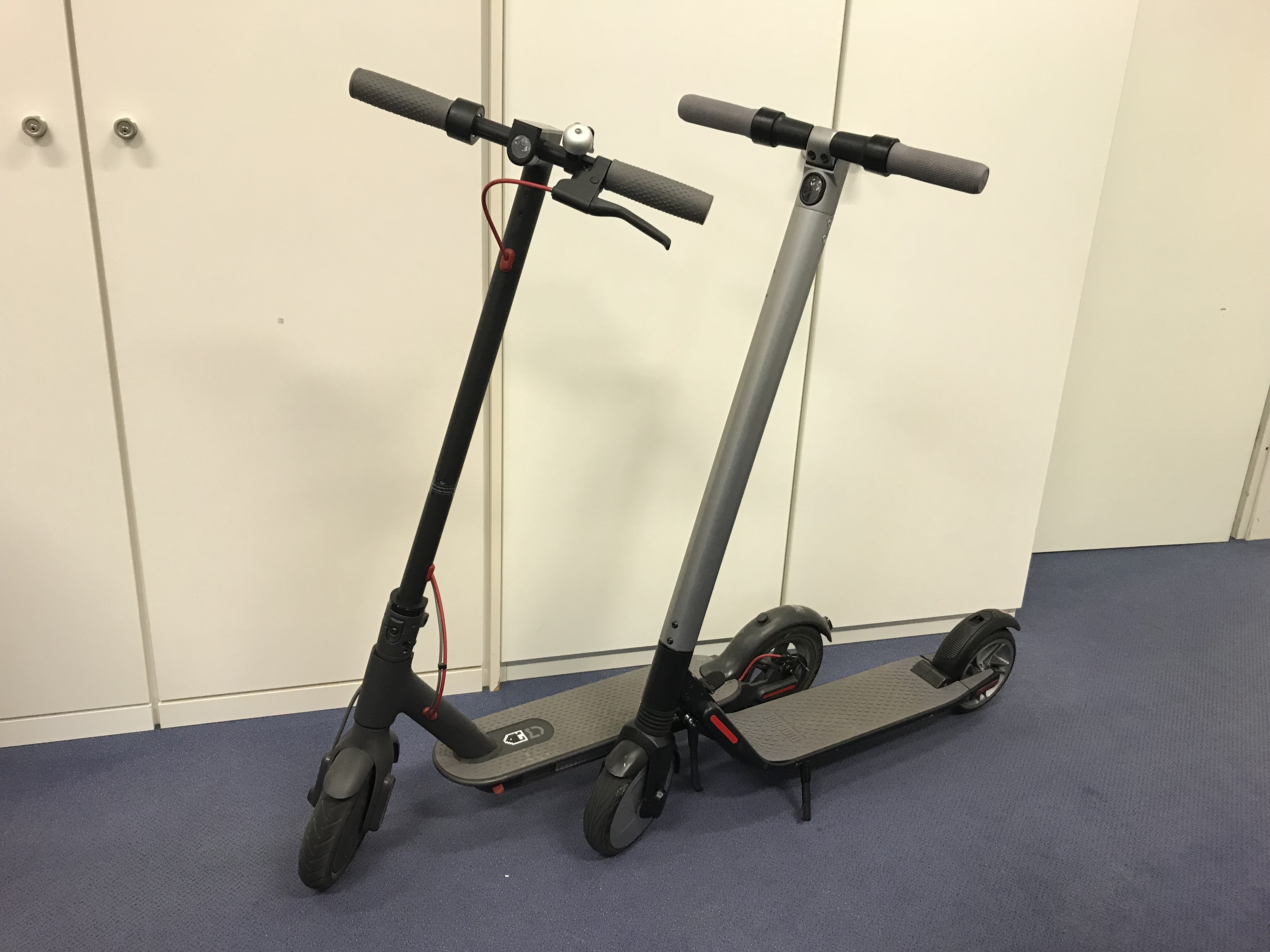 Xiaomi 365 und Ninebot ES2